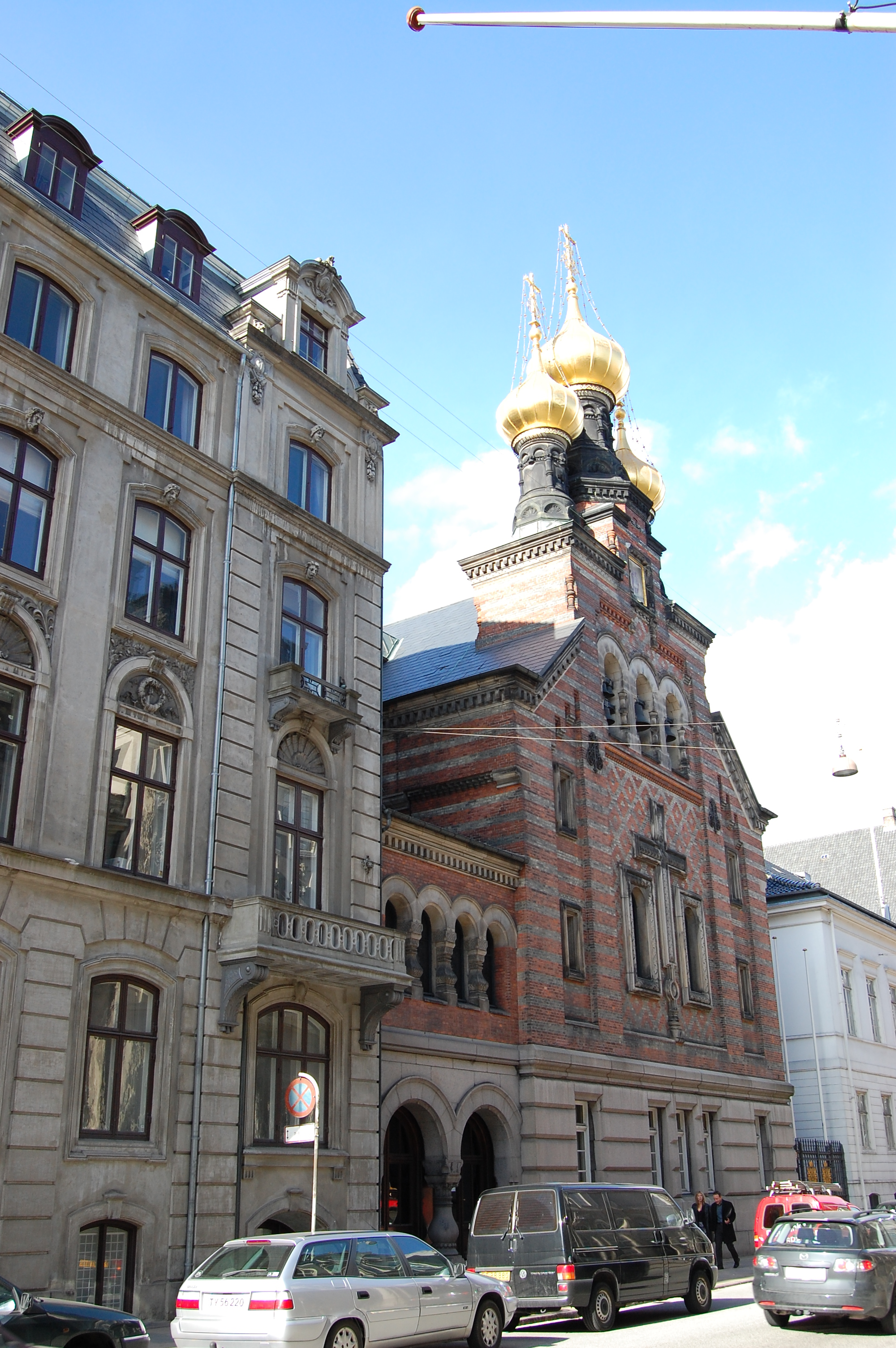 The Alexander Nevsky Church in Bredgade in Copenhagen, Denmark